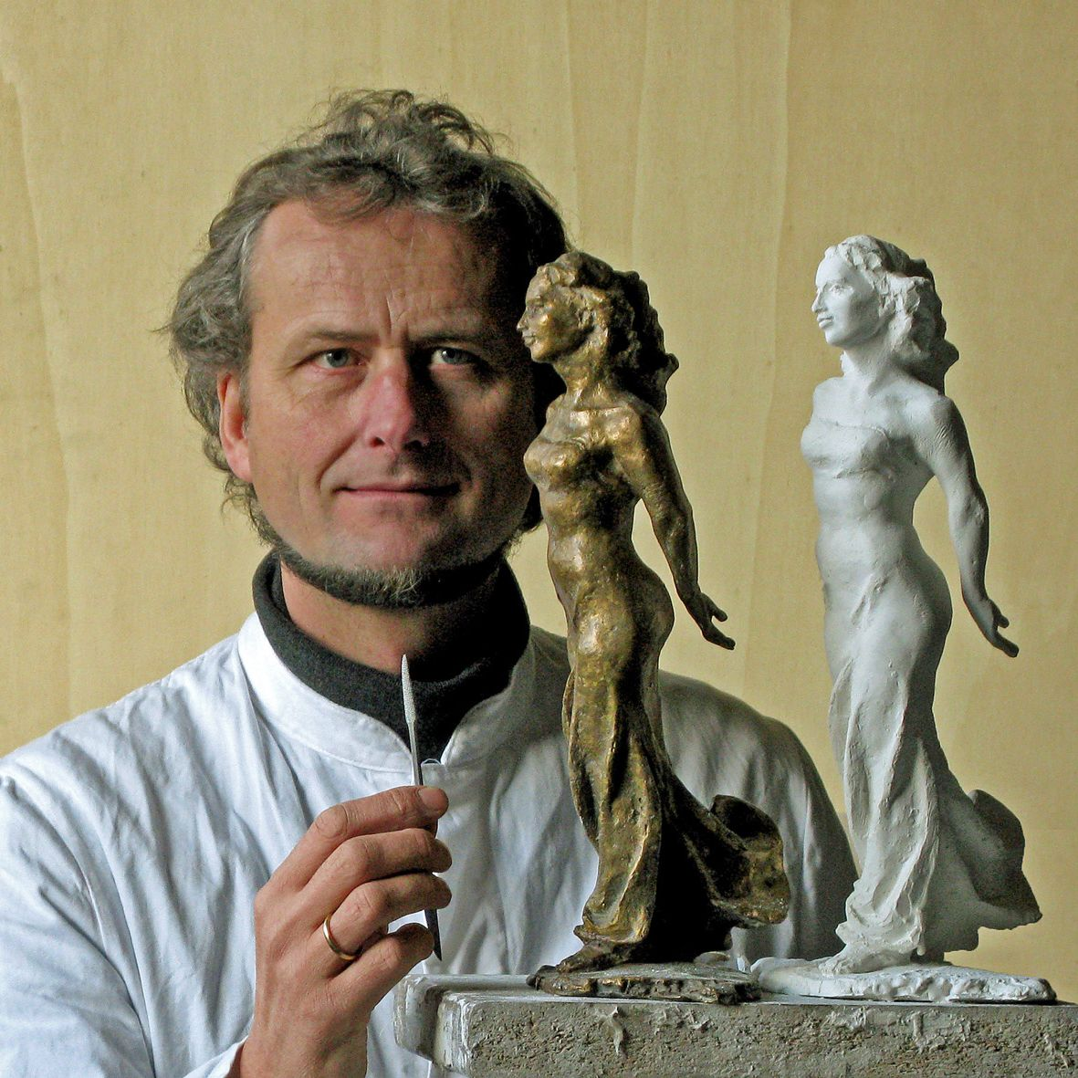 Portrait Magnus Kleine-Tebbe, Bildhauer, mit Modellen